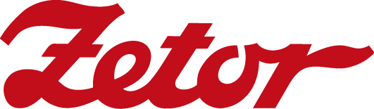 Logo